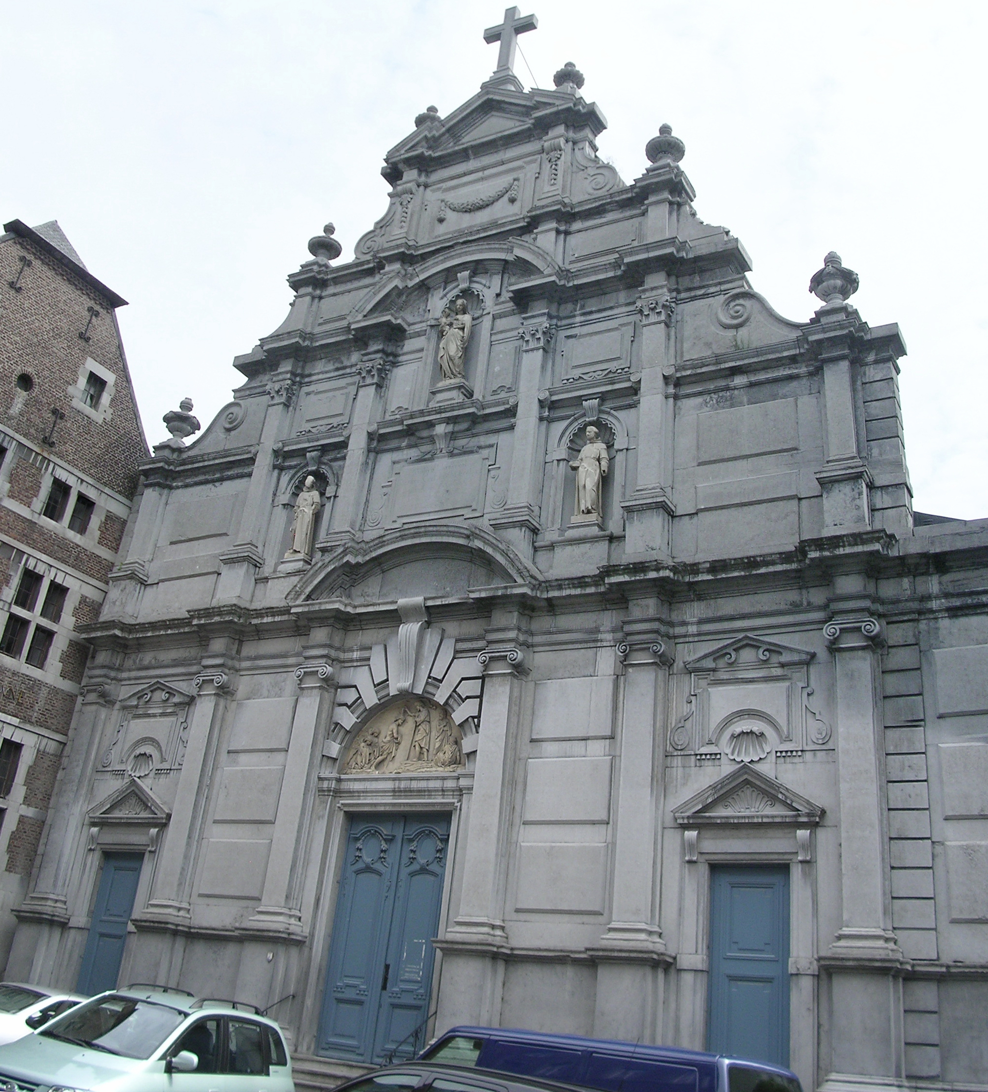 façade baroque - église accolée au Musée de la Vie Wallonne